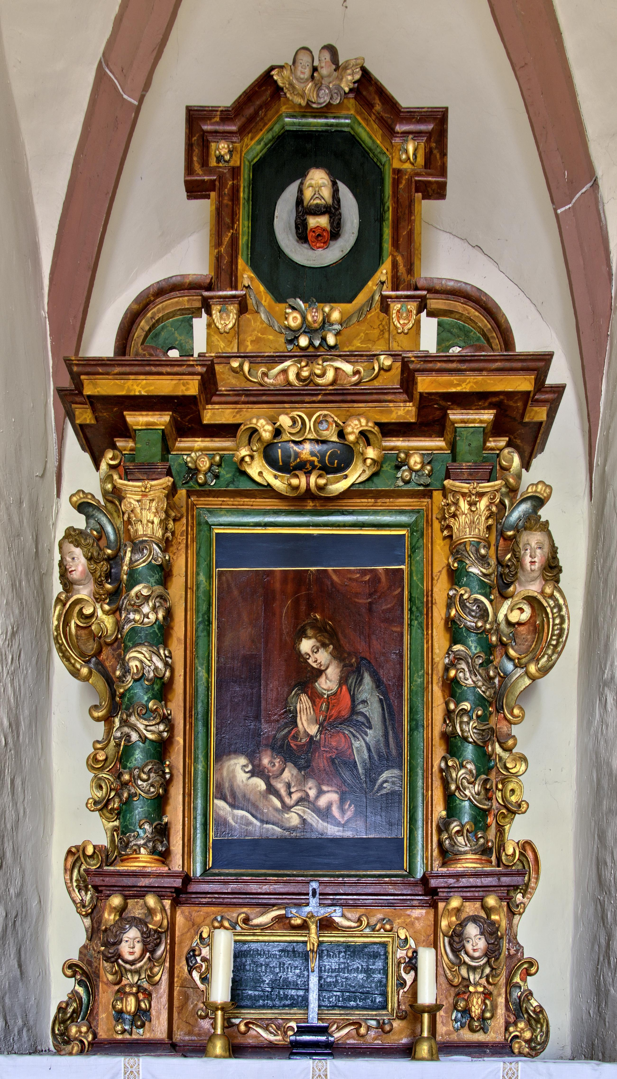 Johanneskapelle in Staufen im Breisgau